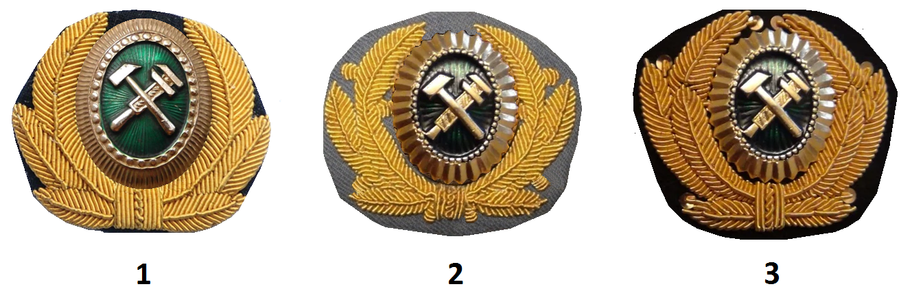 Кокарды внс мпс